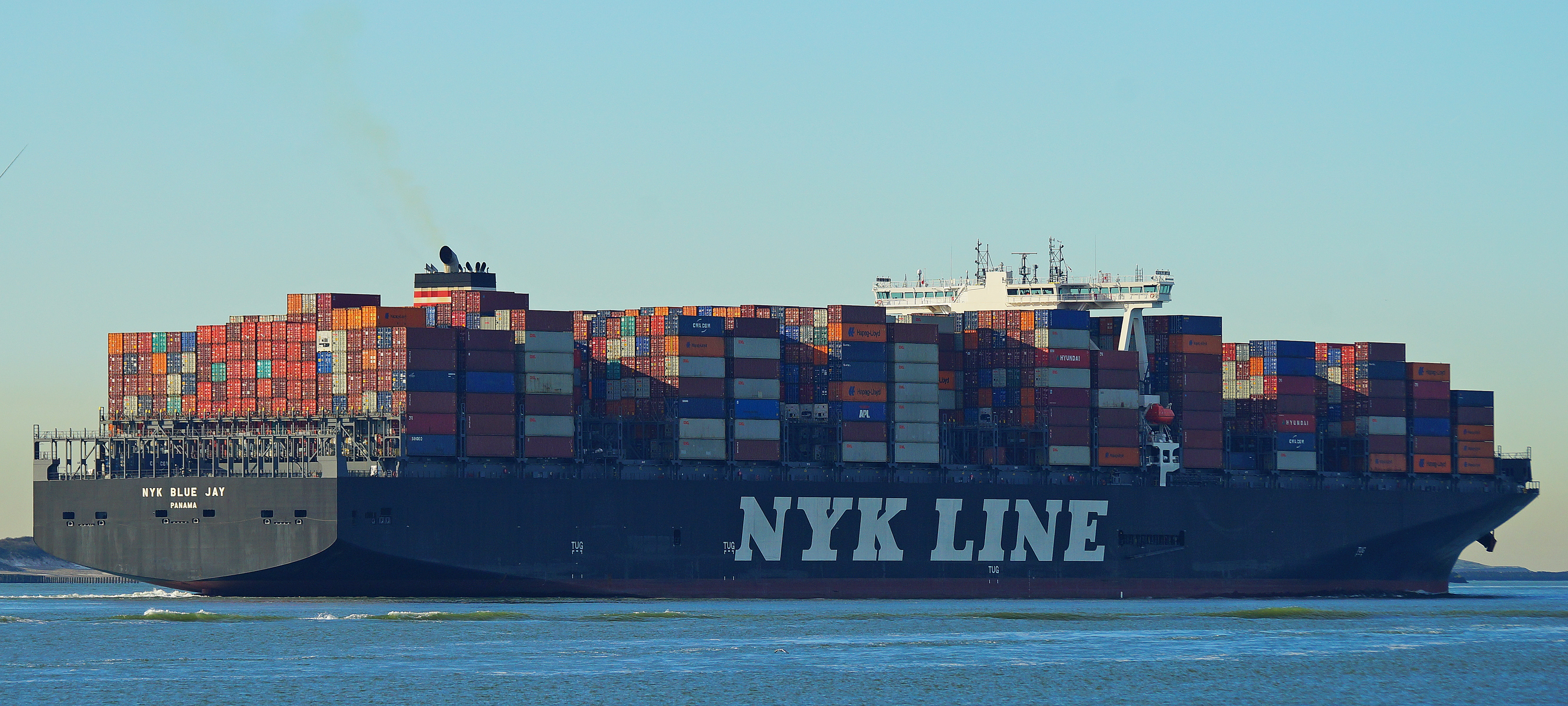 Maasmond 20-1-2017